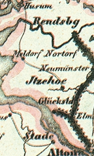 Ausschnitt Marschbahn aus der Bahnkarte_Deutschland_1849